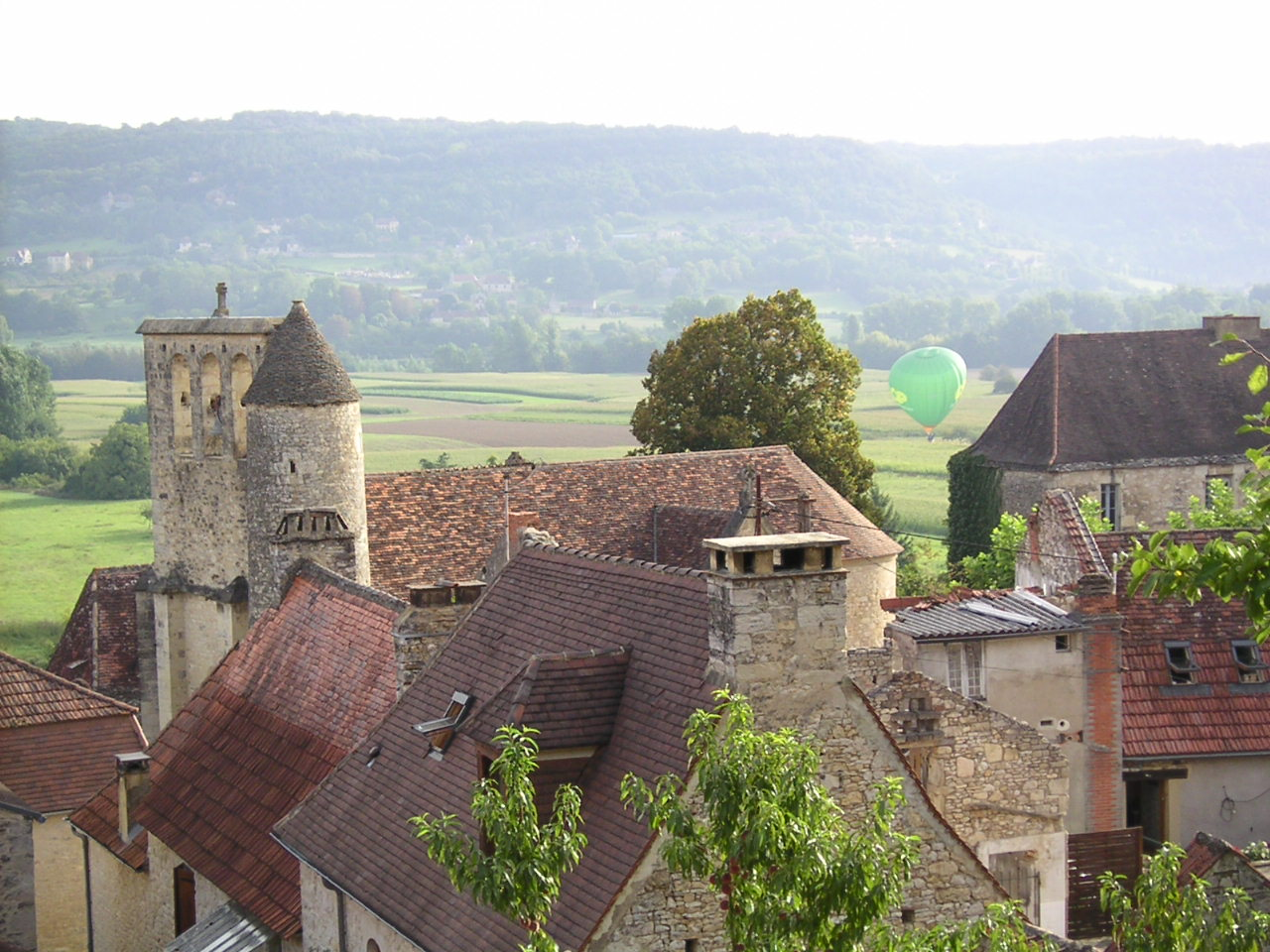 Bourg d'Allas Les Mines